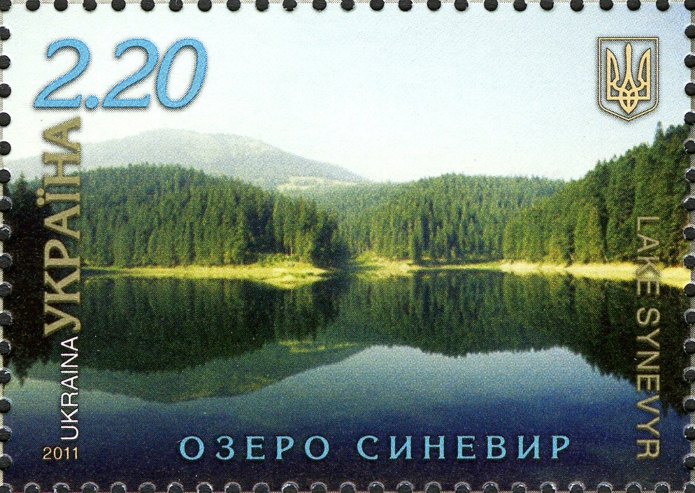 Озеро Синевир на марці, присвяченій проекту "Сім природніх чудес України"